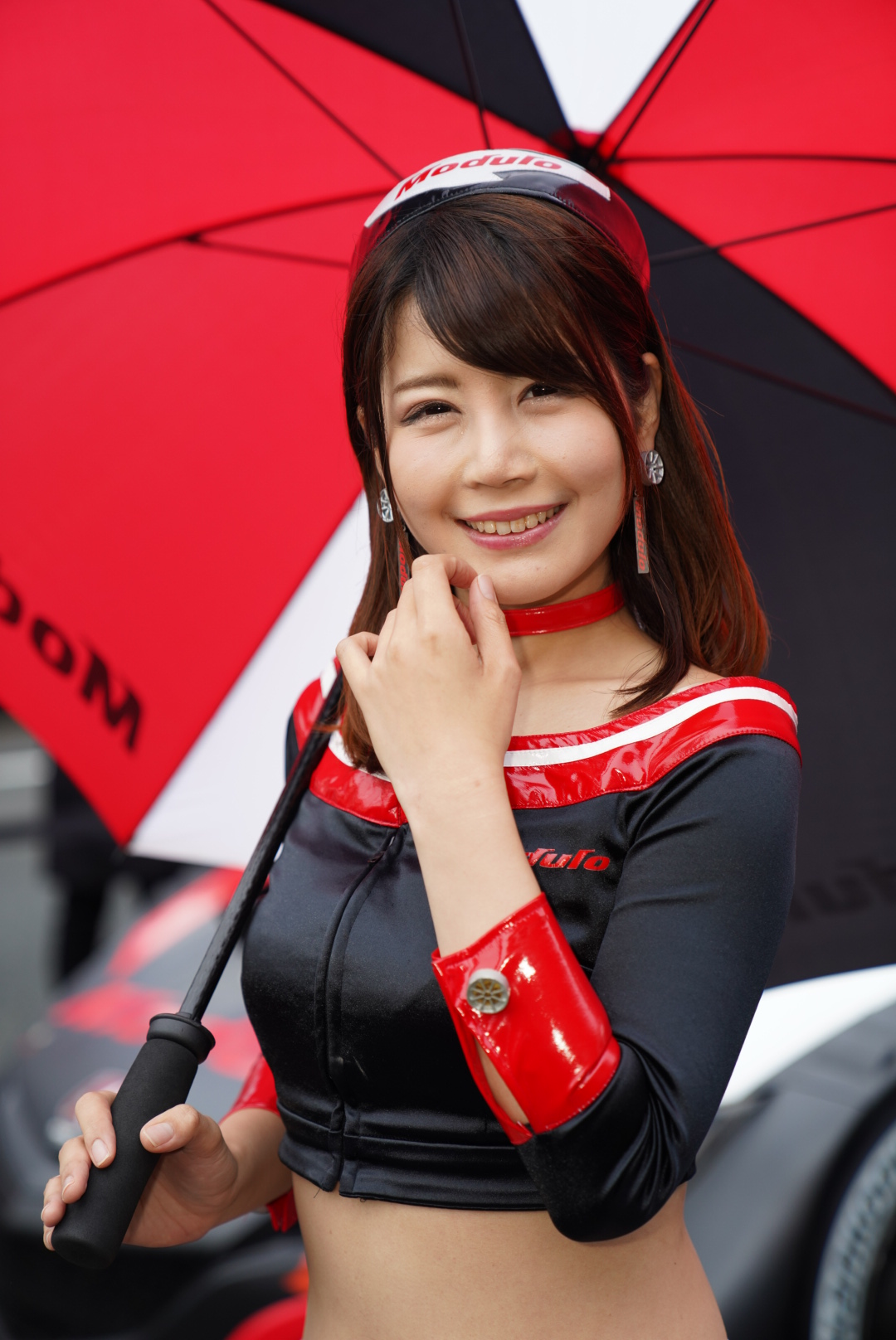 Moduloプリティの永原芽衣さん